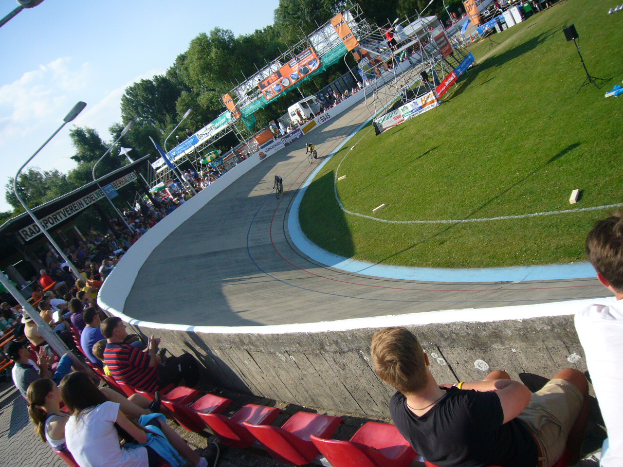 Die Radbahn des RSV Edelweiss Oberhausen in Oberhausen-Rheinhausen im Juli 2013 während der Deutschen Bahnrad-Meisterschaften.